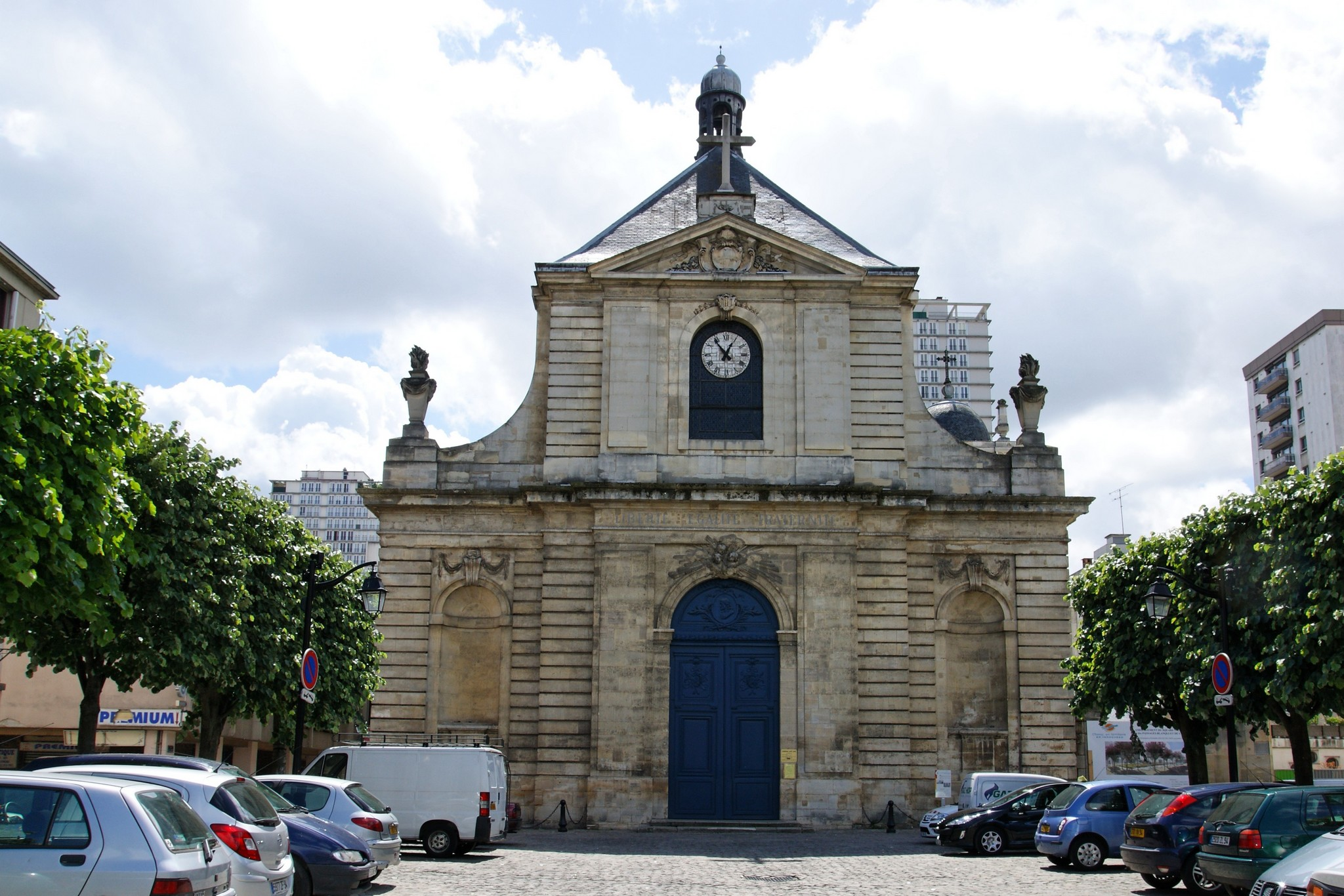 Eglise Saint Louis à Choisy Le Roi